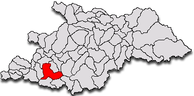 Categorie:Hărţi ale judeţului Maramureş